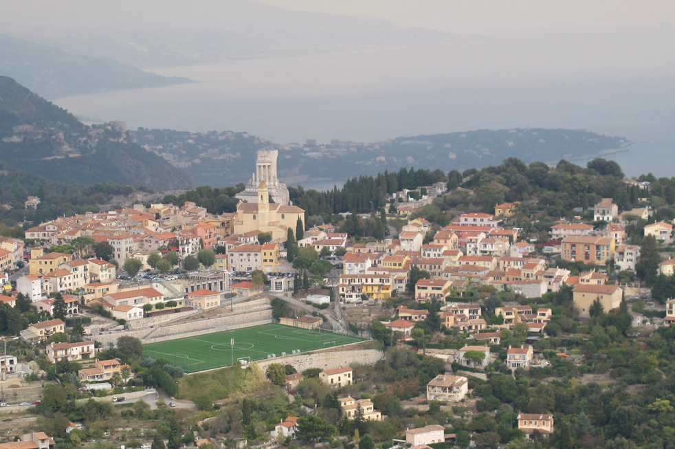 La Turbie vue de la cime de la Forna, France